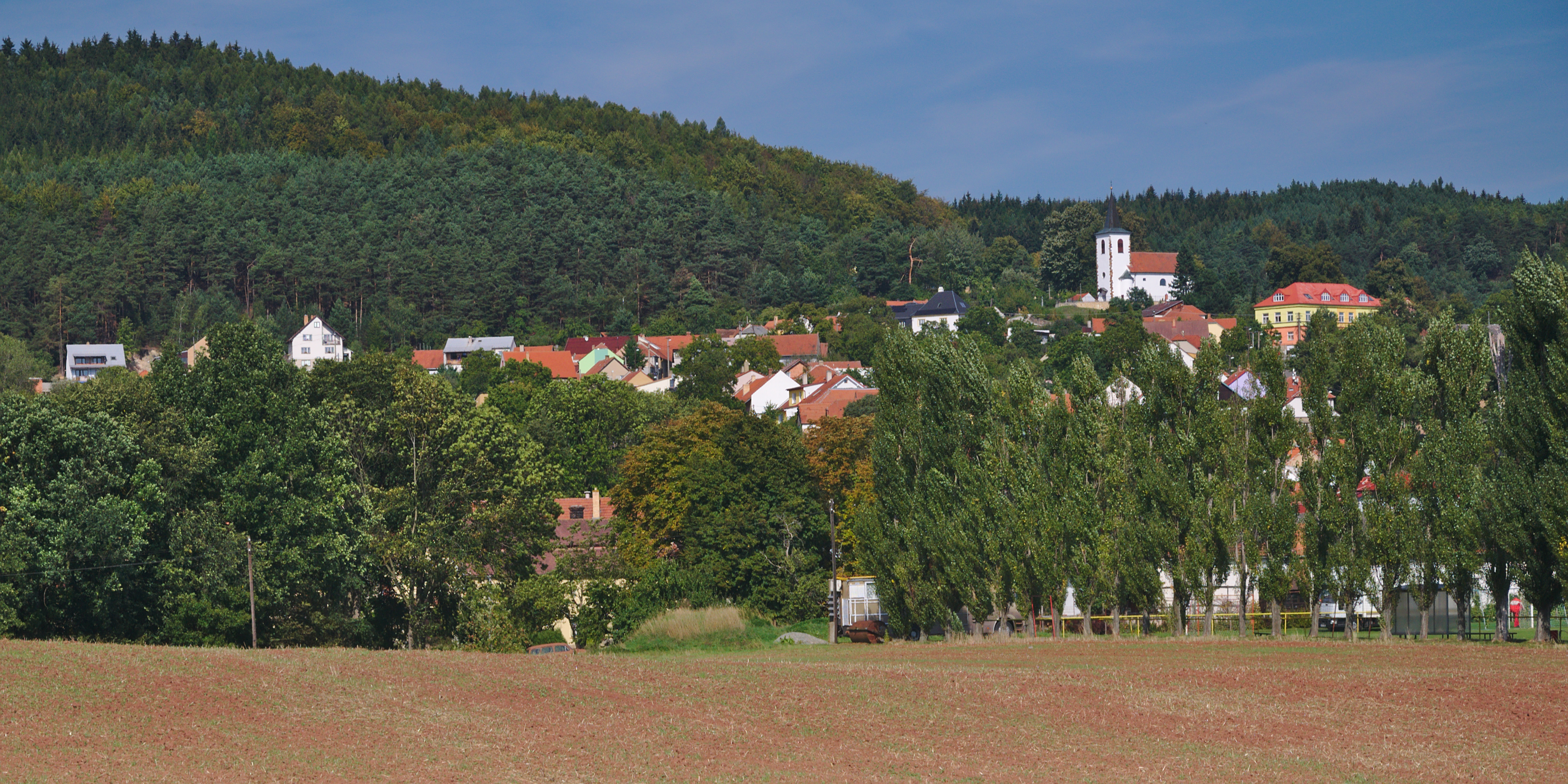 Pohled na obec od jihu, Vísky, okres Blansko